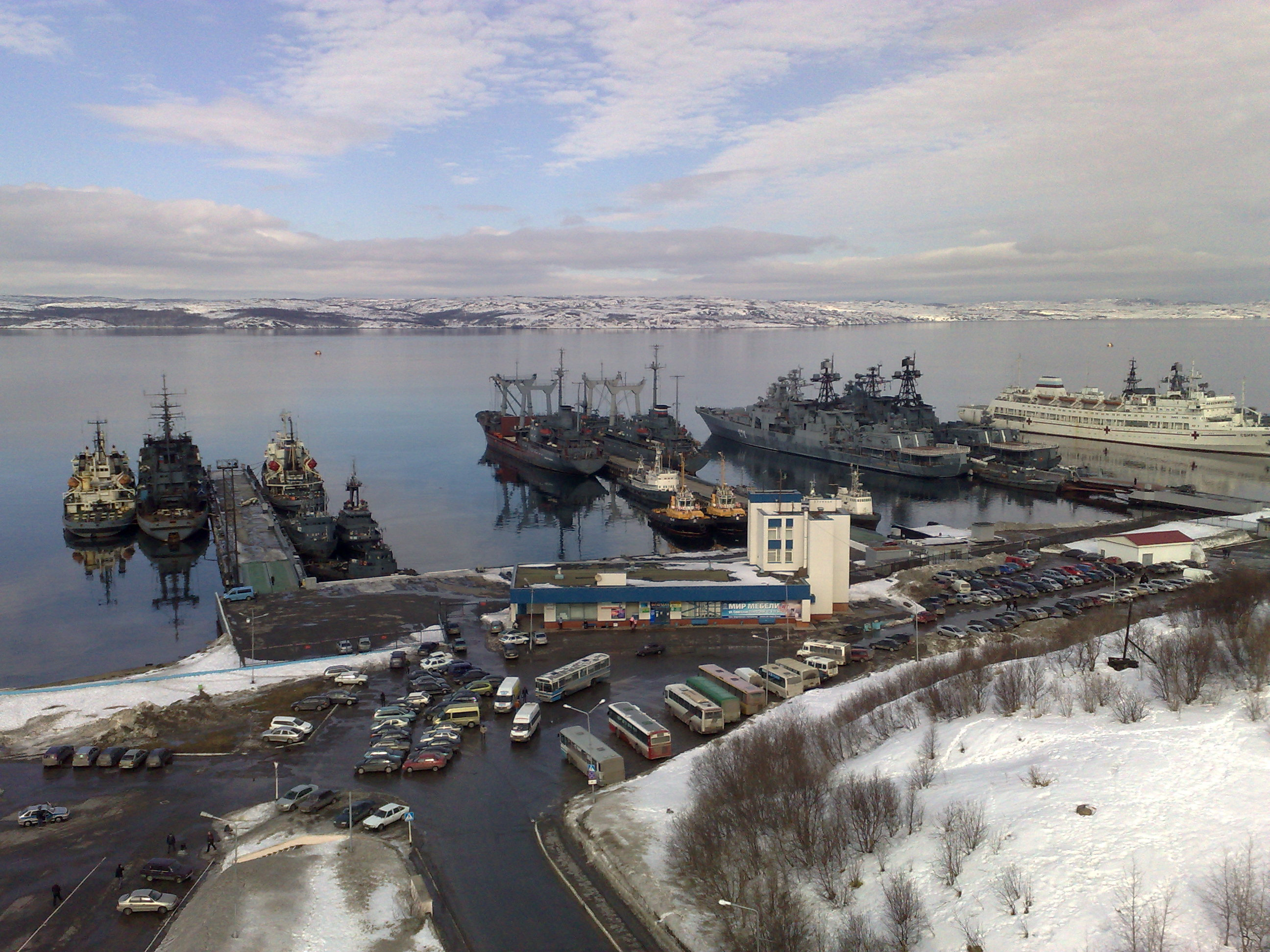 Стоянка кораблей. Североморск